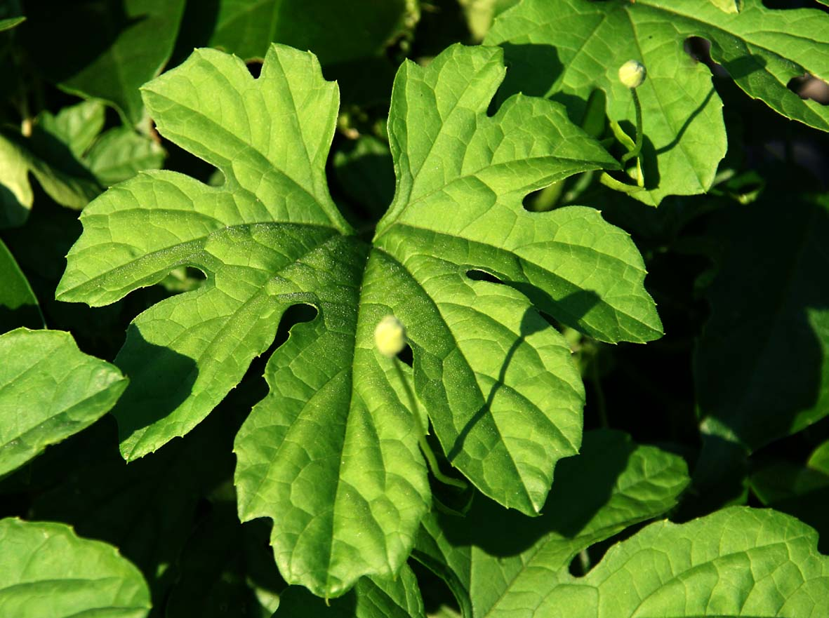 margose feuille